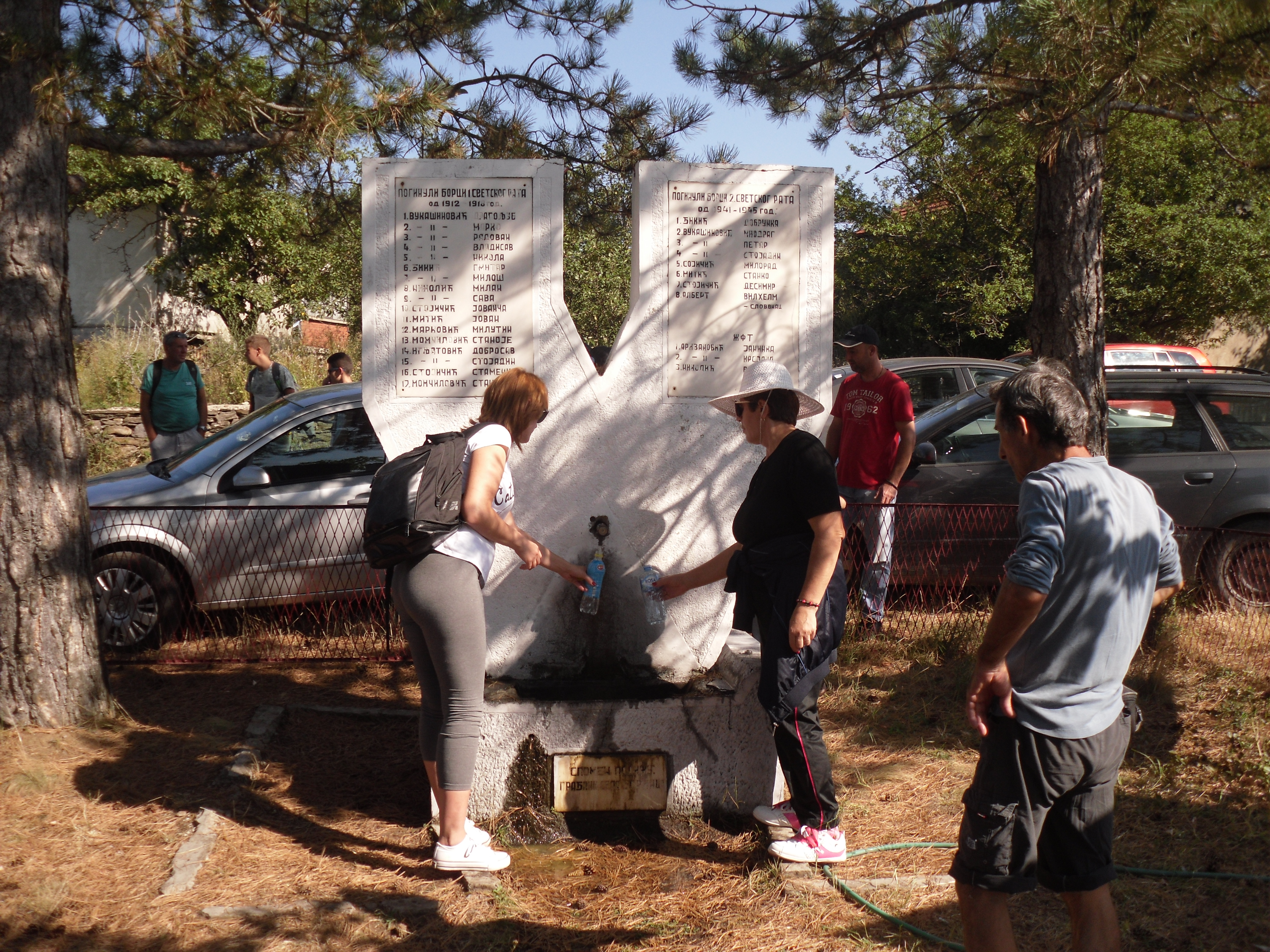 Srpski (latinica): Spomen česma u selu Borincu.